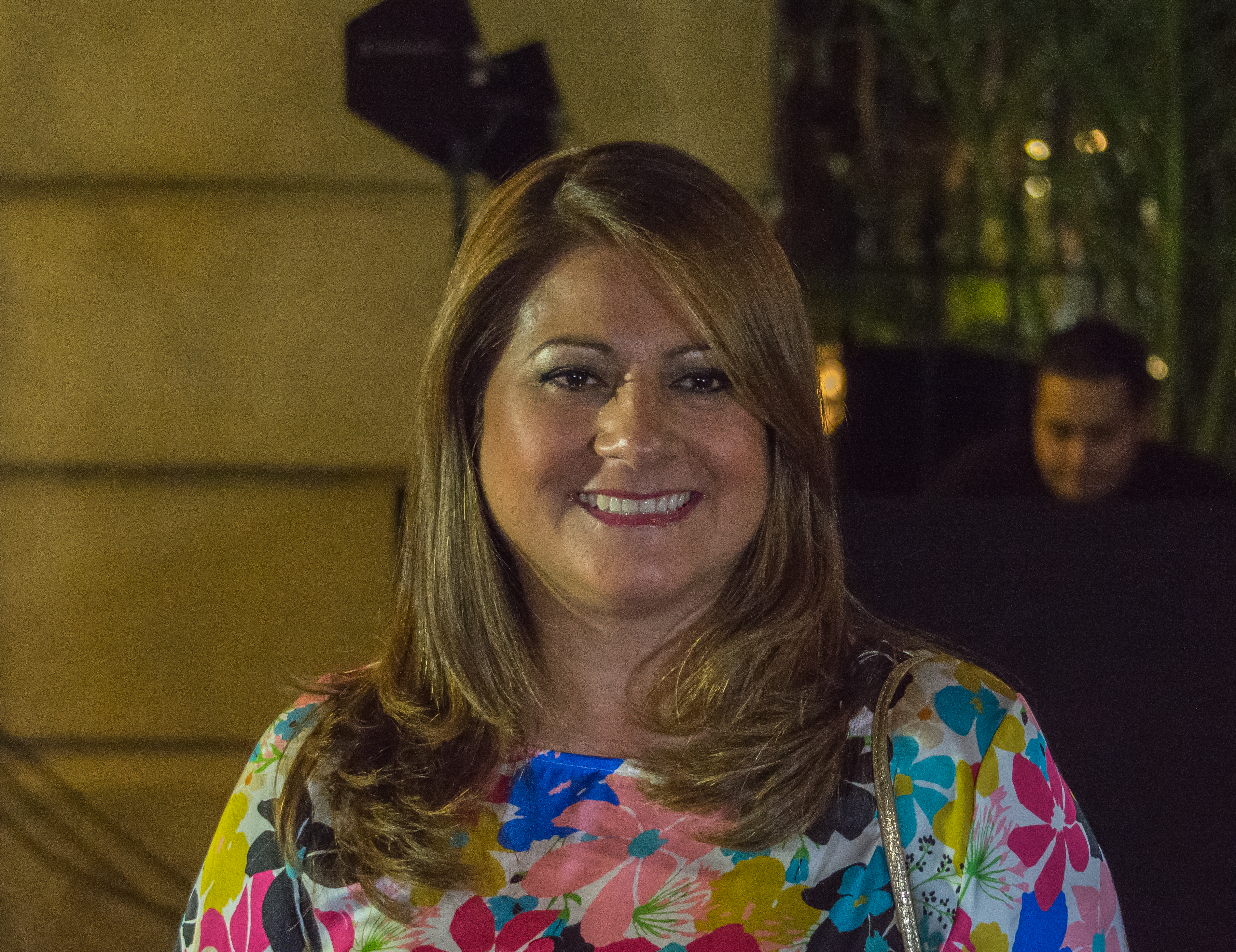 Natalia Cuevas, Premios Caleuche, Teatro Oriente, Providencia, Santiago, Región Metropolitana de Santiago, Chile.